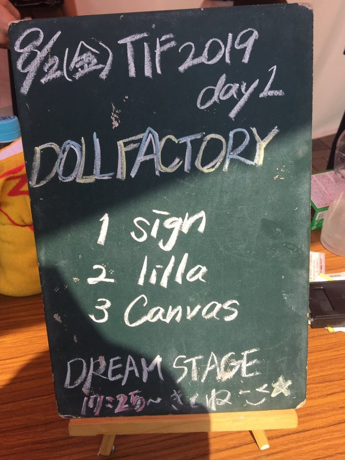 amiinAセトリボード